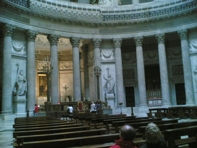 Interno, Basilica di San Francesco di Paola, Napoli